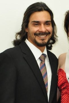 Isabela Crociolli e o ator André Gonçalves, da TV Globo, durante o Concurso Miss Regional Turismo Oeste Paulista